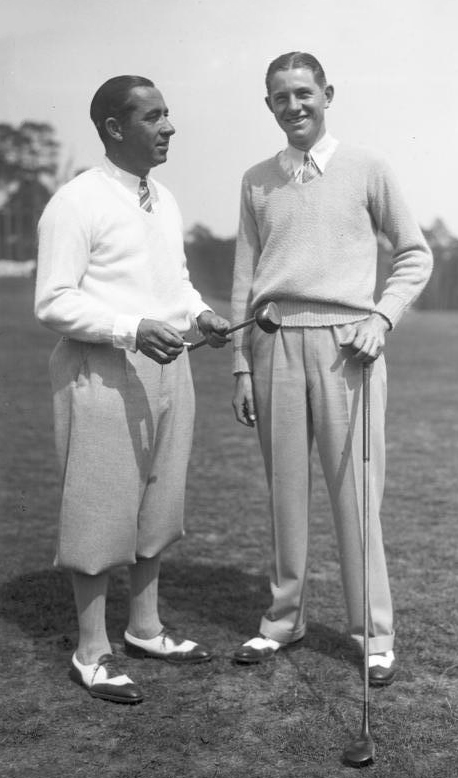 Die Golfmeisterschaften auf dem Golfplatz in Wannsee bei Berlin! Der Golfweltmeister Walter Hagen (links) Amerika und Horton Smith (rechts) Amerika, das stärkste Paar in der Internationalen Golfmeisterschaft.